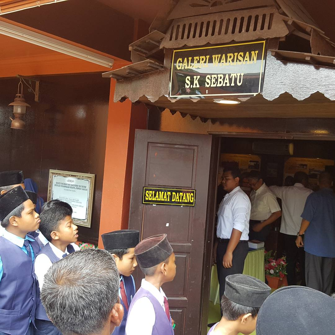 Pelajar-pelajar sekolah yang dijemput sama-sama untuk melihat galeri